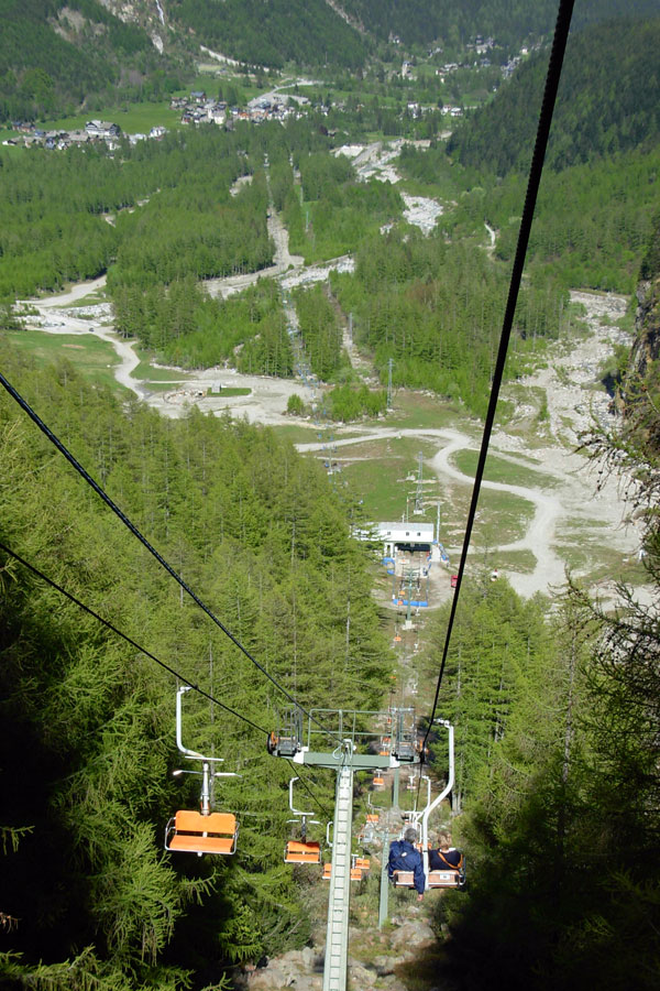 Il tratto in discesa da Belvedere a Burki. Sullo sfondo il tratto successivo fino a Pecetto.